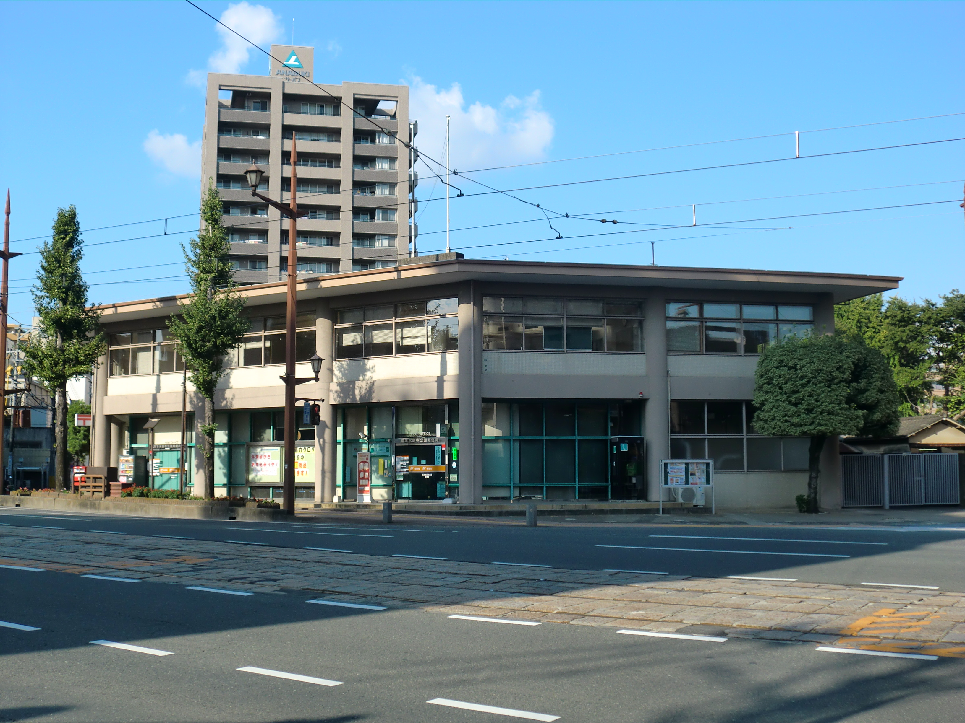 熊本市中央区にある熊本水前寺公園（くまもとすいぜんじこうえん）郵便局（この建物は撤去されていますので不動産会社の物件広告への掲載を禁止します）